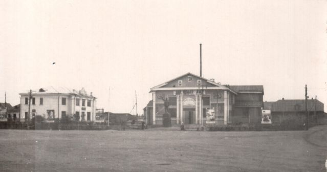 Красногорск, Сахалинская область, Центр, площадь Ленина, 60-е годы XX века.